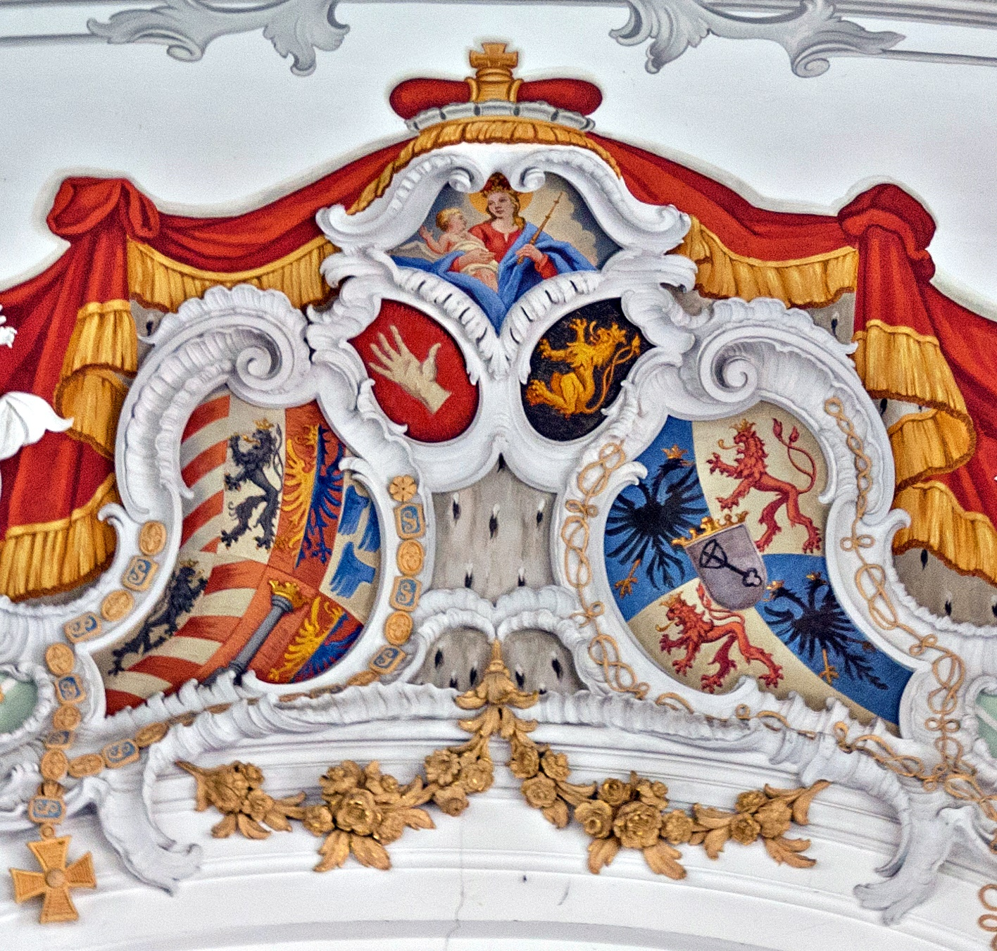 Wappen der Fürstäbtissin Therese Wilhelmine von Pollheim-Winkelhausen (+ 1757), Stiftskirche Lindau